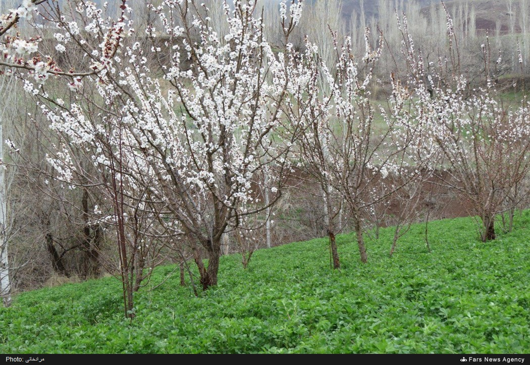 روستای برندق